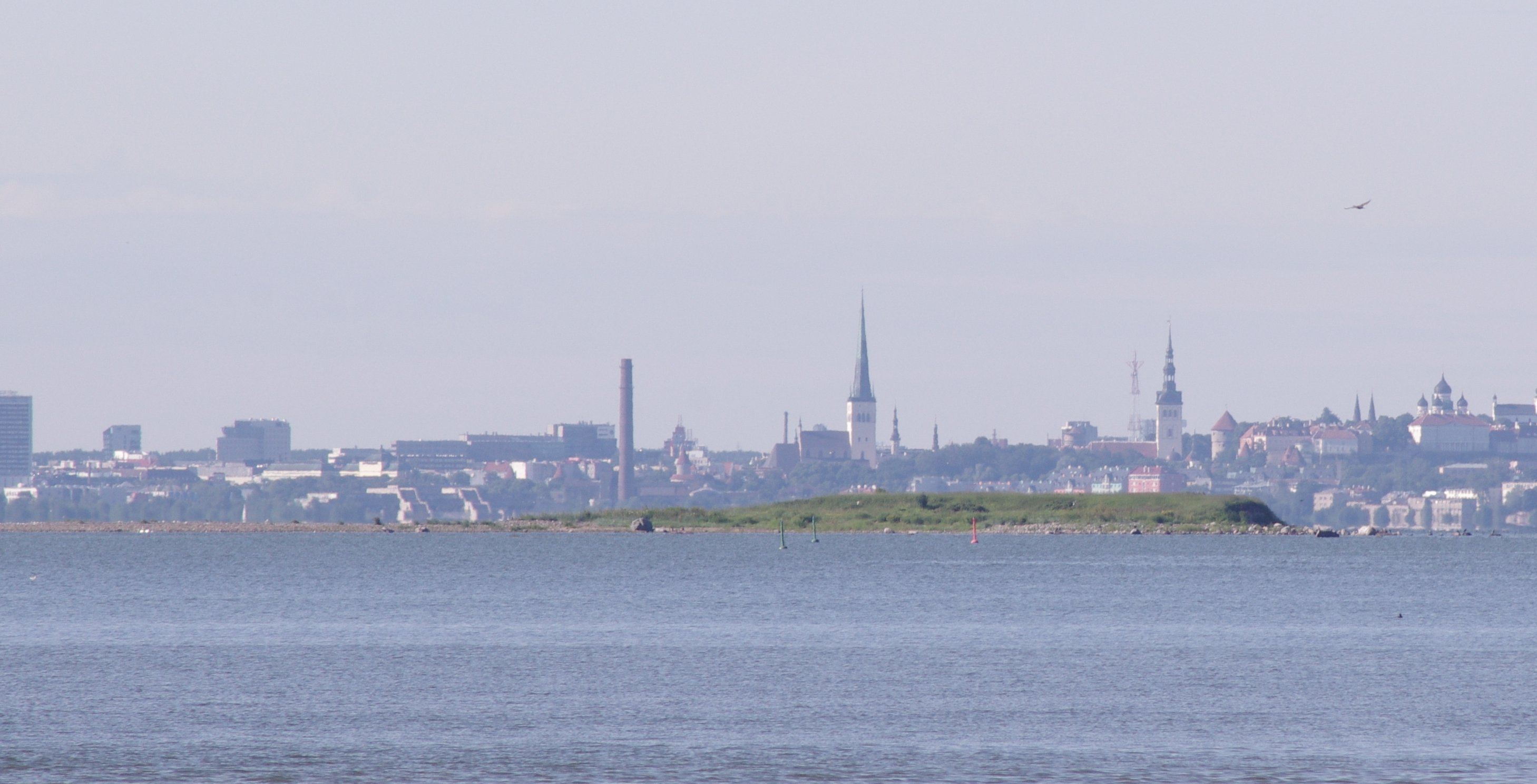 Pandju saar põhjast